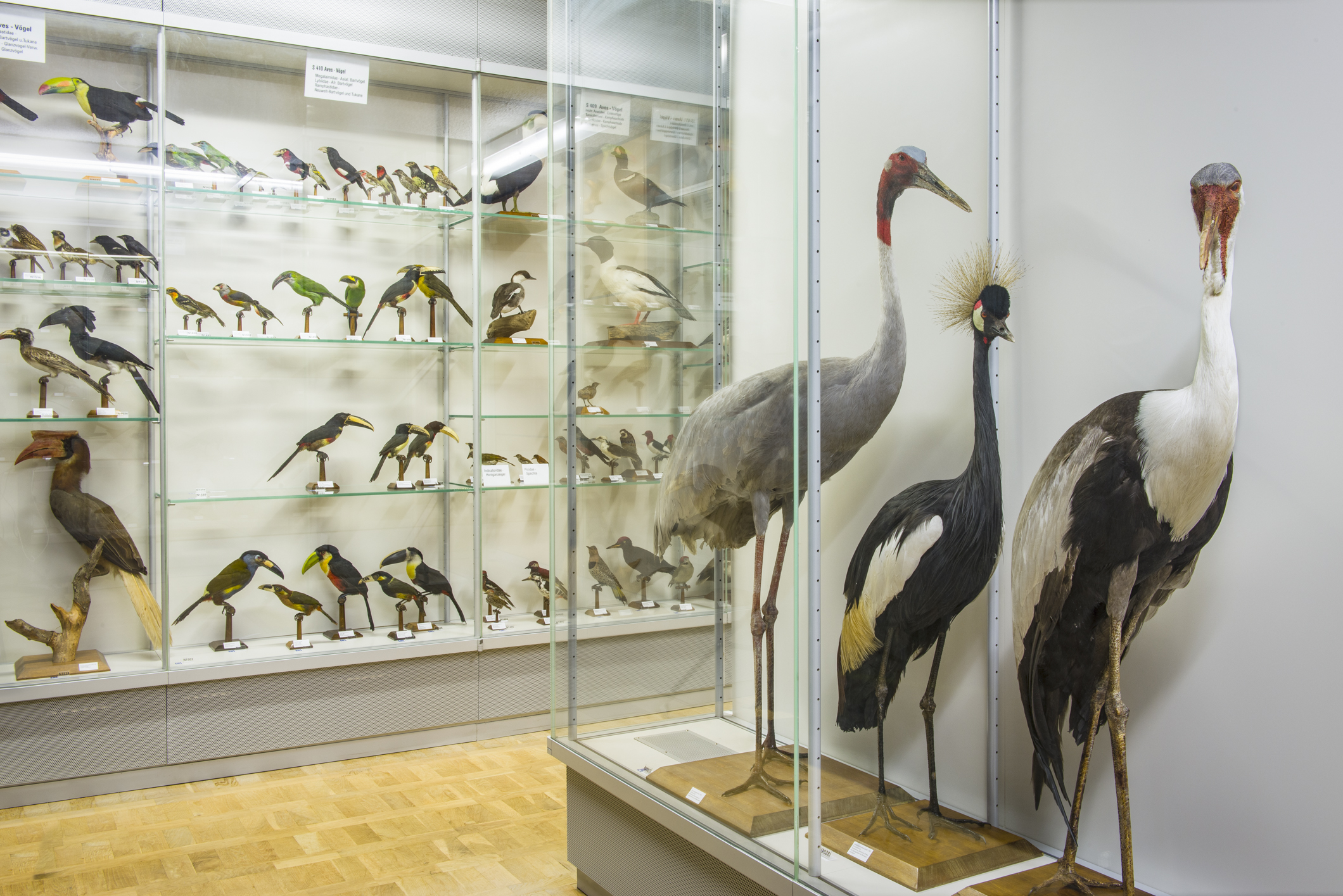 Magazin 2019